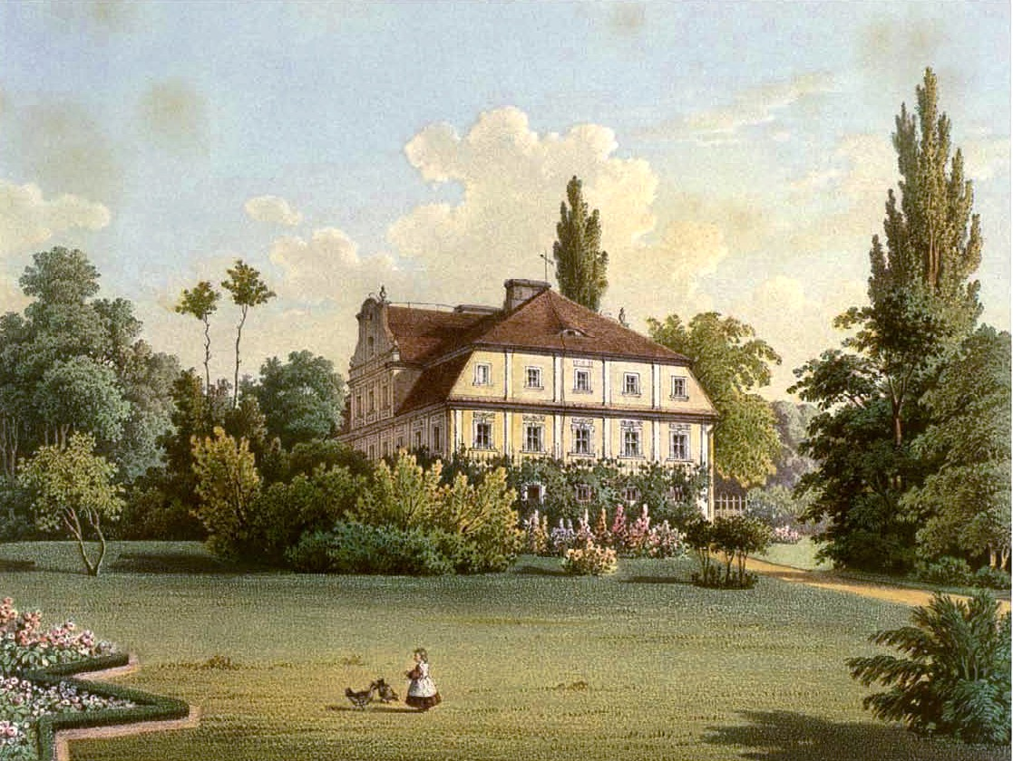 Rittergut Scheibau, Kreis Freistadt